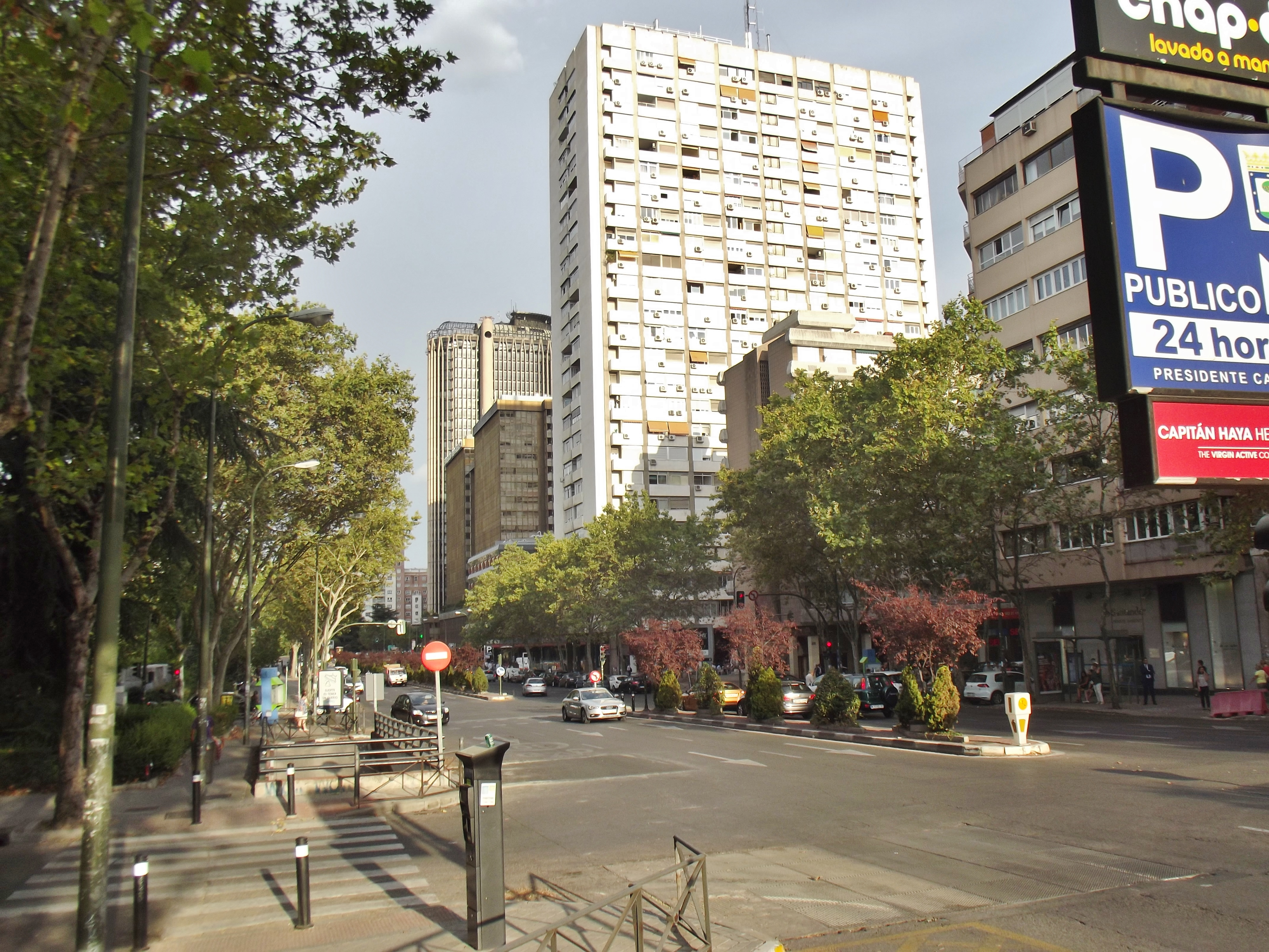 Avenida del General Perón, Madrid.